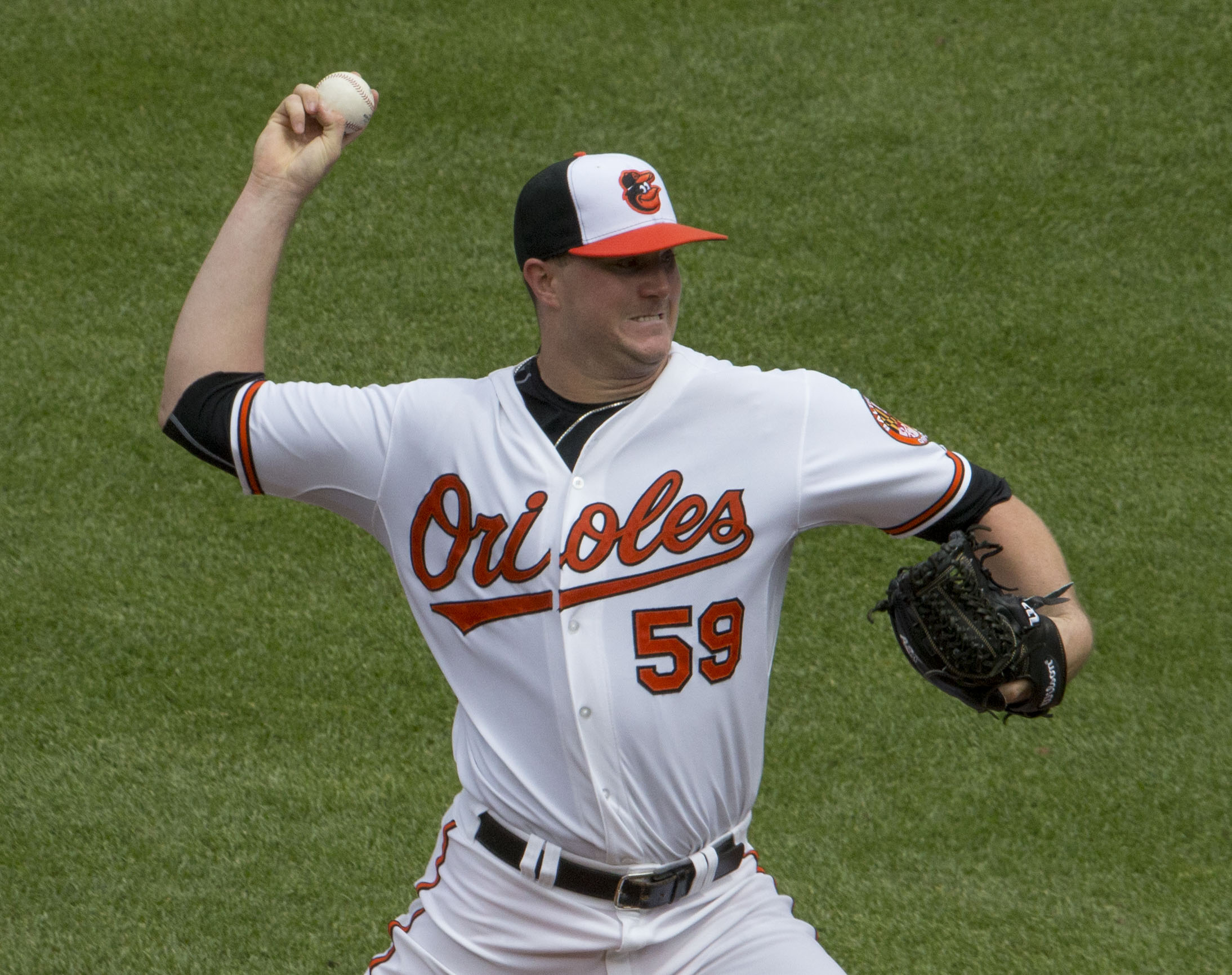 Mike Wright